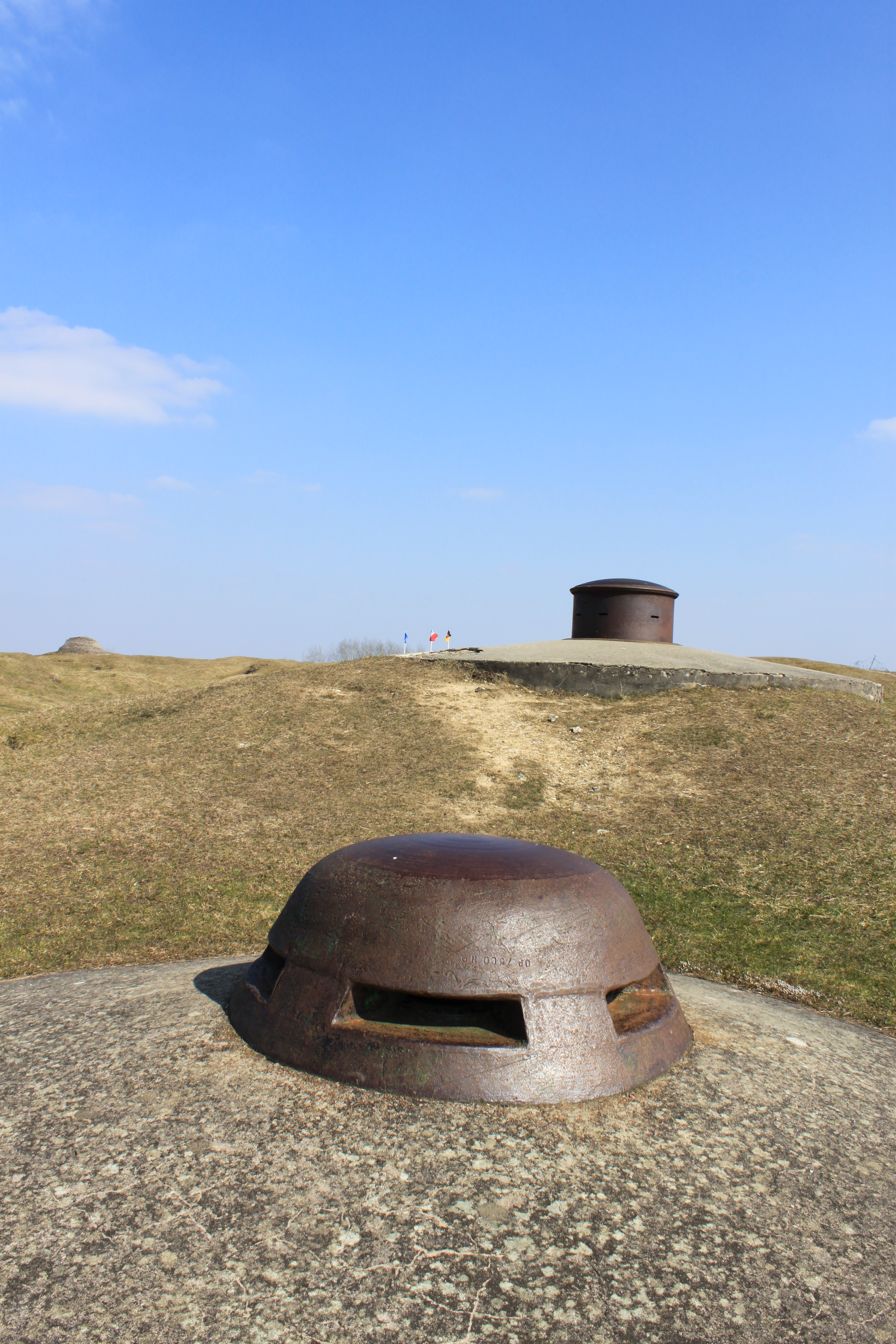 Panzerturm GF4 Mle 1899 für zwei Maschinengewehre, Beobachtungstand auf der Festung Doaumont.